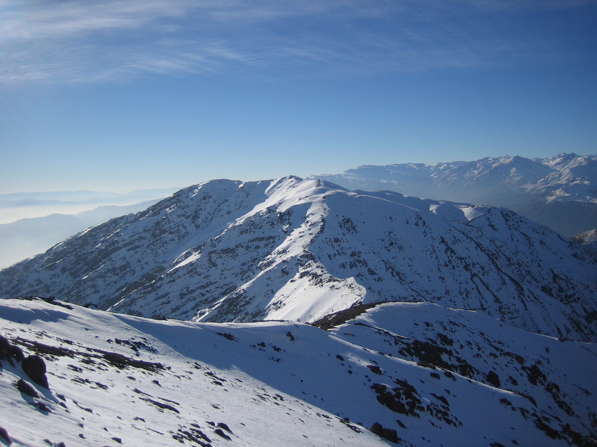 Cerro Provincia, Chile, 2006